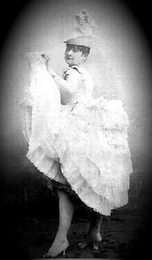 origine wiki en